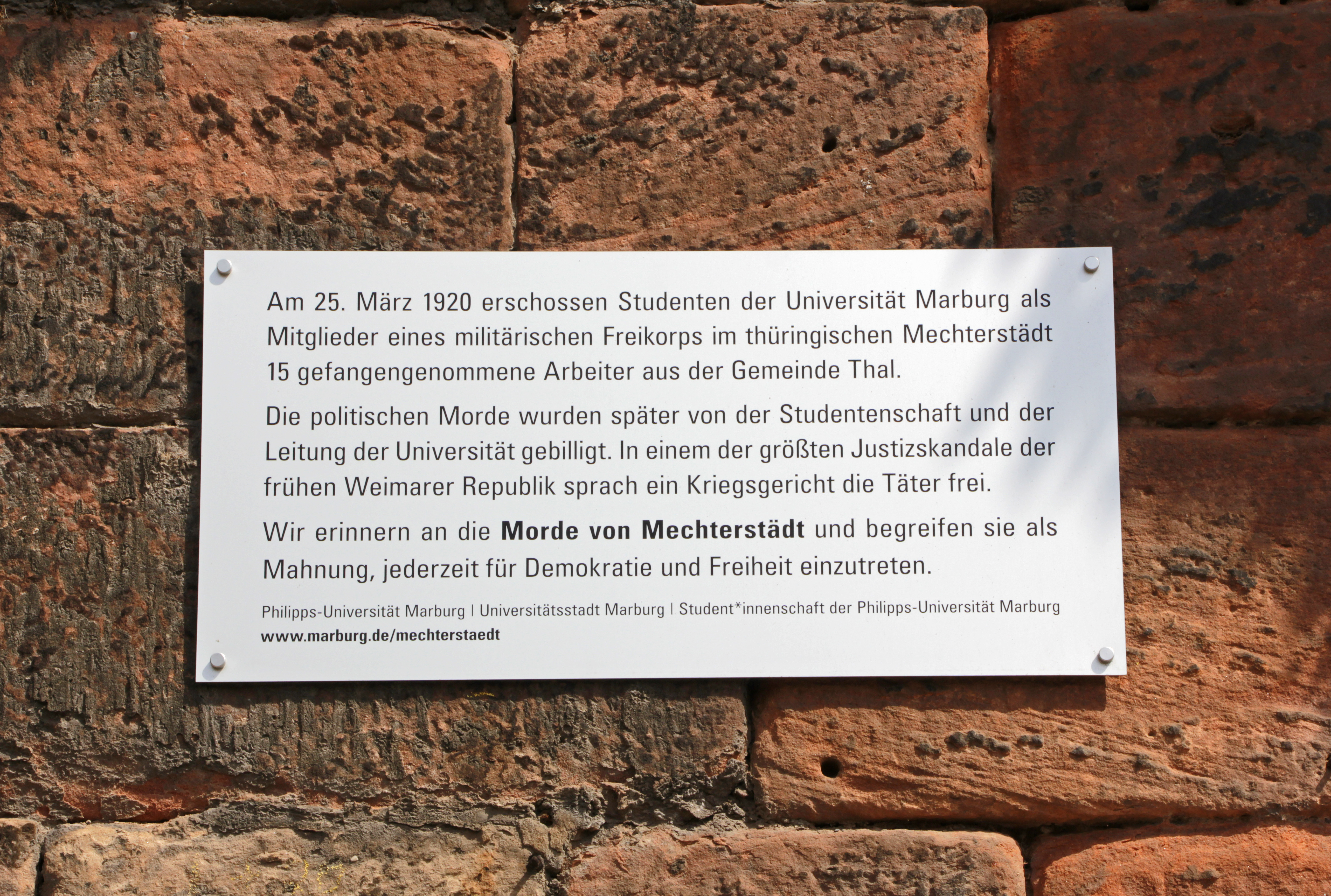 Gedenktafel für die Morde von Mechterstädt, die am 2. April 2019 im Rahmen einer Gedenkveranstaltung der Stadt Marburg und der Philipps-Universität an der Alten Universität angebracht wurde. Standort: Lahntor Inschrift: “Am 25. März 1920 erschossen Studenten der Universität Marburg als Mitglieder eines militärischen Freikorps im thüringischen Mechterstädt 15 gefangengenommene Arbeiter aus der Gemeinde Thal. Die politischen Morde wurden später von der Studentenschaft und der Leitung der Universität gebilligt. In einem der größten Justizskandale der frühen Weimarer Republik sprach ein Kriegsgericht die Täter frei. Wir erinnern an die Morde von Mechterstädt und begreifen sie als Mahnung, jederzeit für Demokratie und Freiheit einzutreten.”